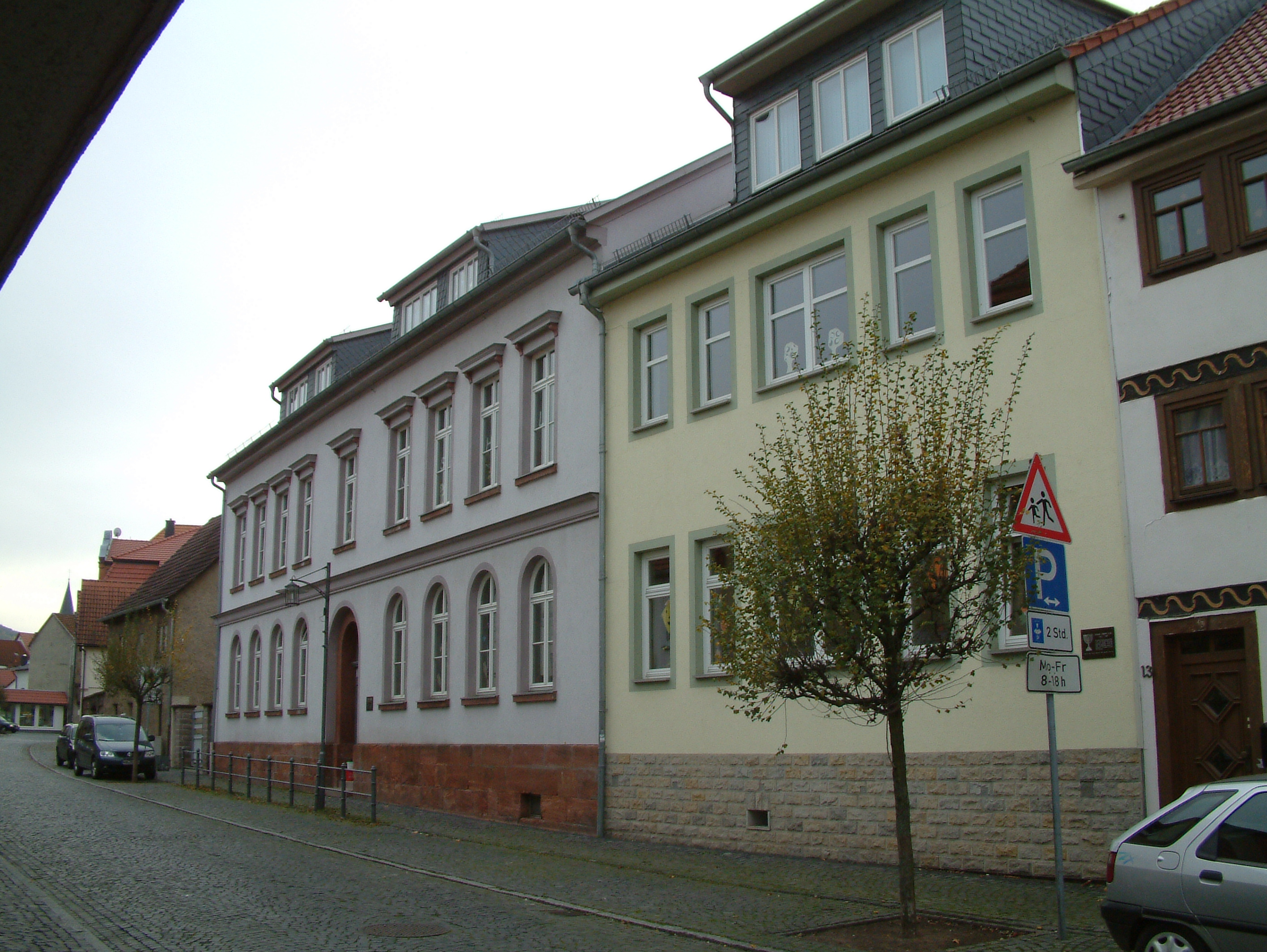 Im Keller der Schule wurde 1998 bei Sanierungsarbeiten eine Mikwe der jüdischen Gemeinde von Vacha entdeckt. Der Baderaum kann nach Anmeldung besichtigt werden.